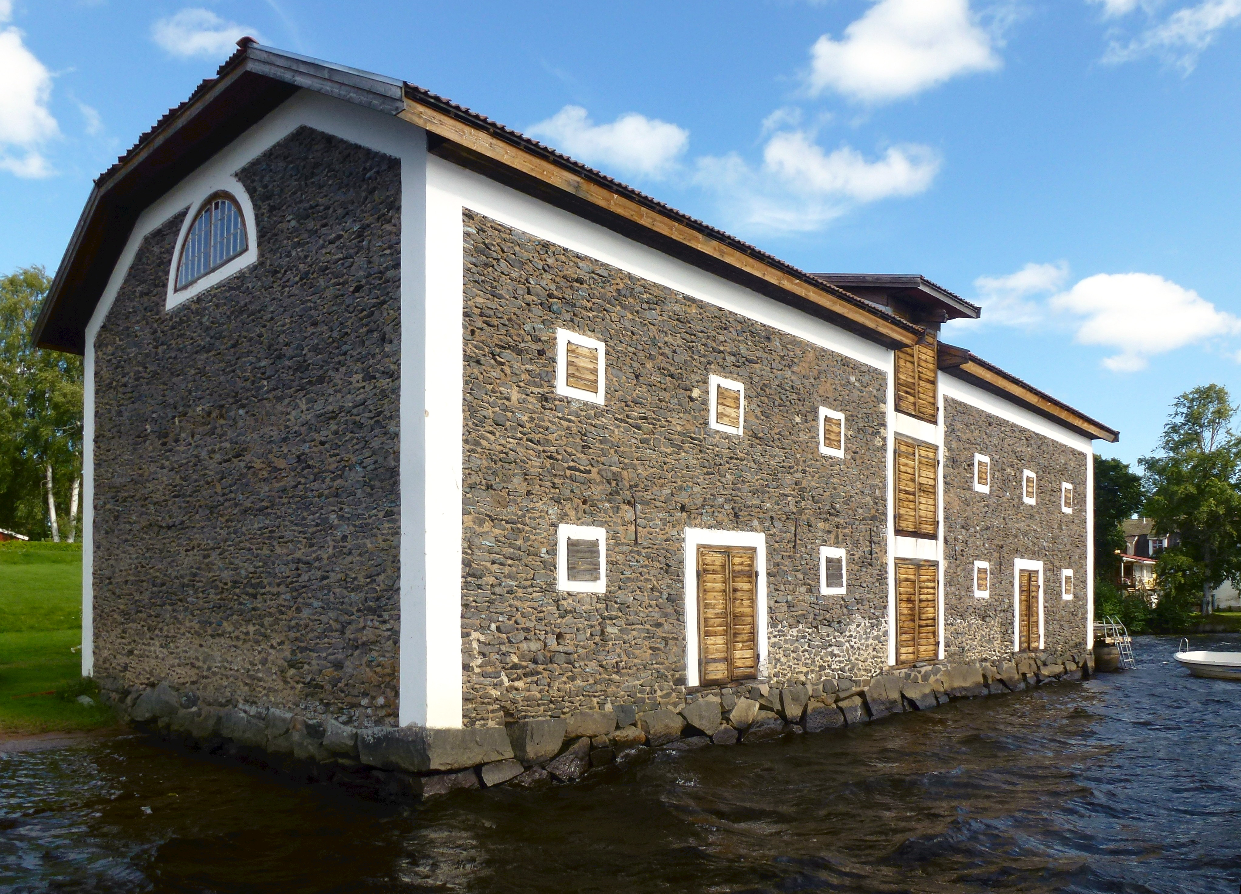 Spannmålsmagasinet i Grangärde